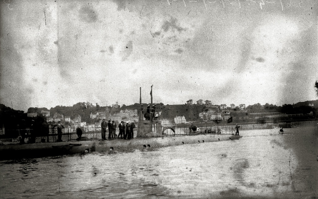 Título original: El submarino militar 'Isaac Peral' en la bahía de la Concha (3/3) Localización: San Sebastián (Guipúzcoa)